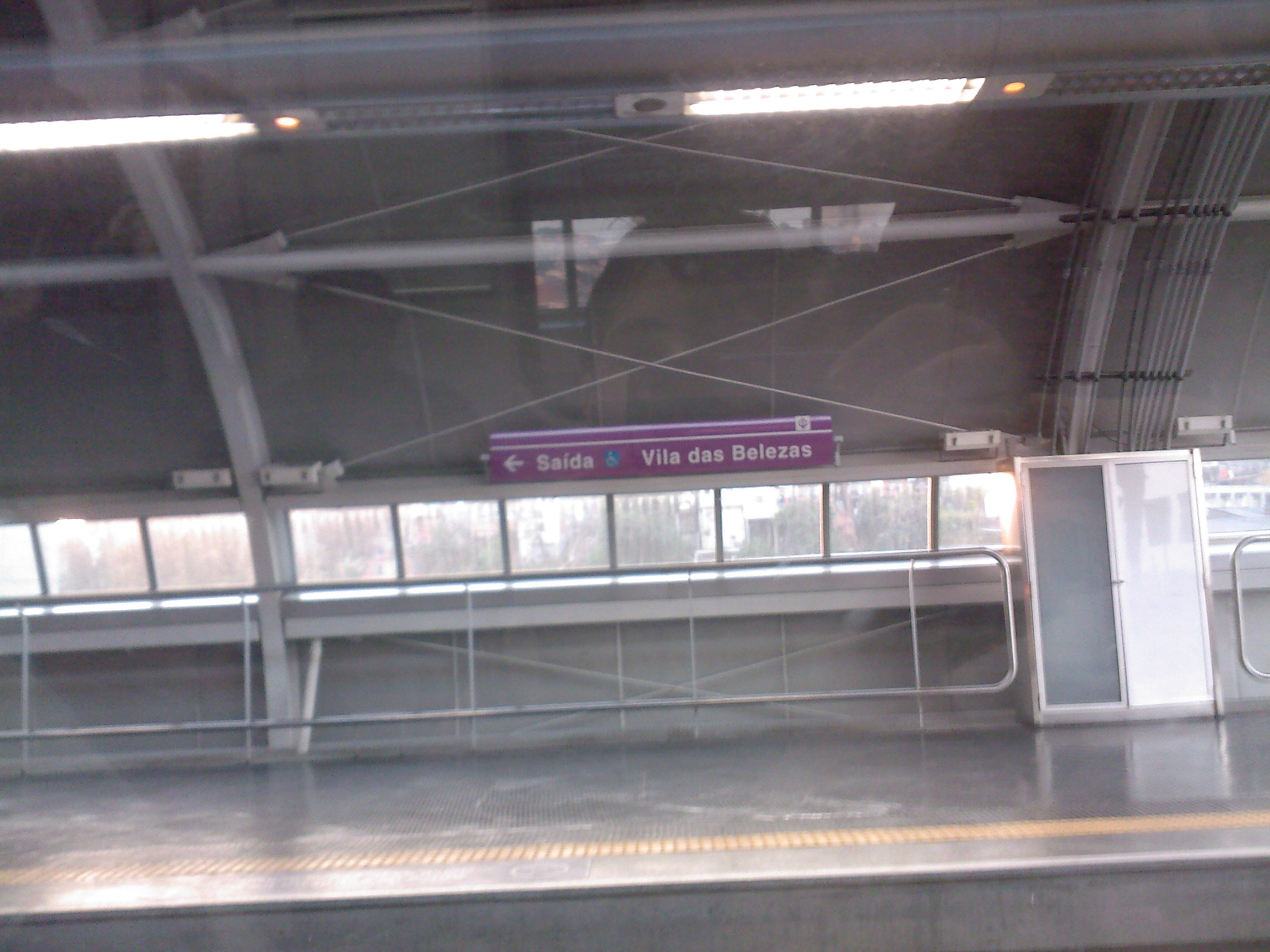 Plataforma da estação Vila das Belezas